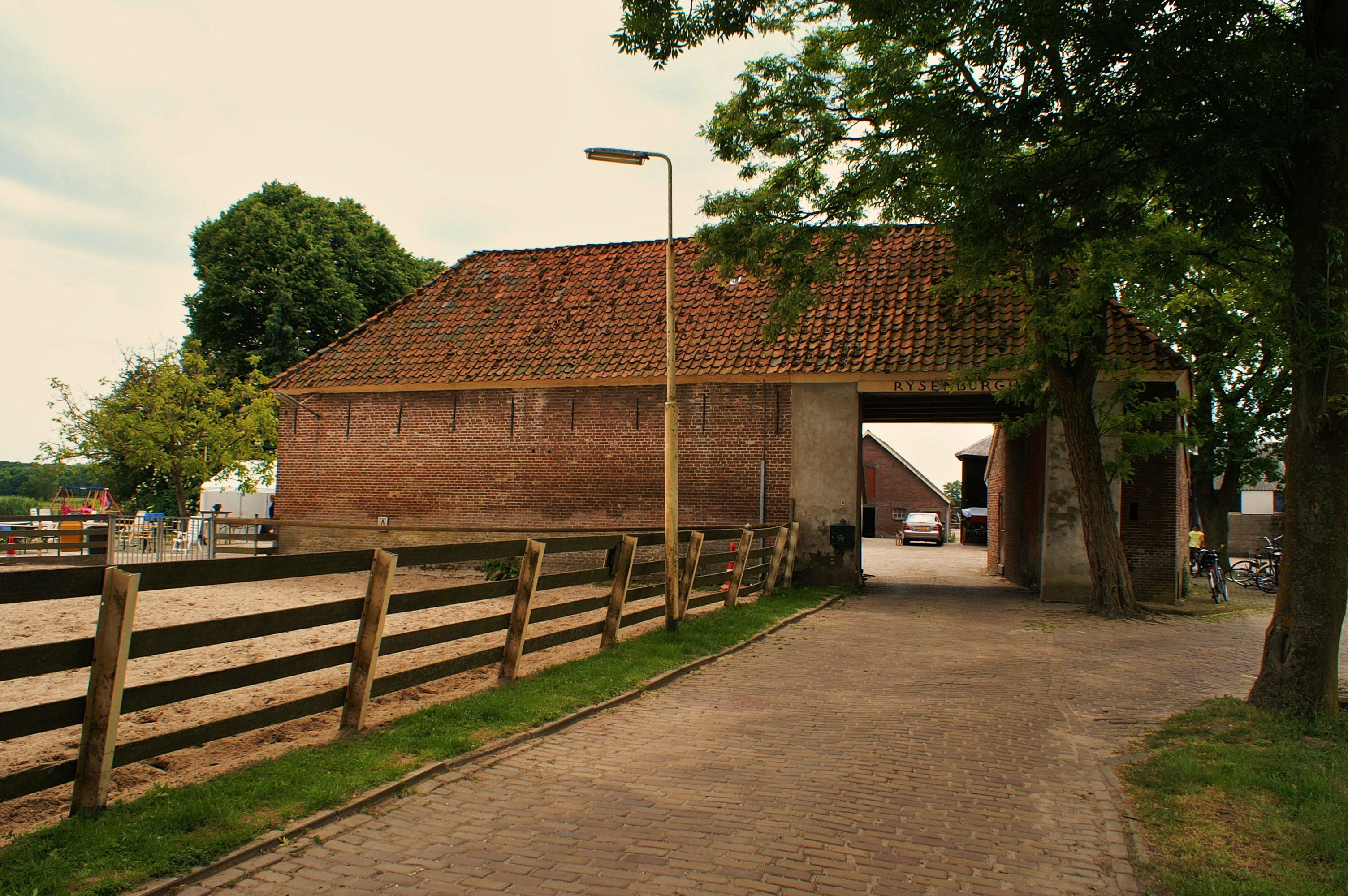 Poortgebouw van kasteel Rijsenburgh te Driebergen-Rijsenburg.